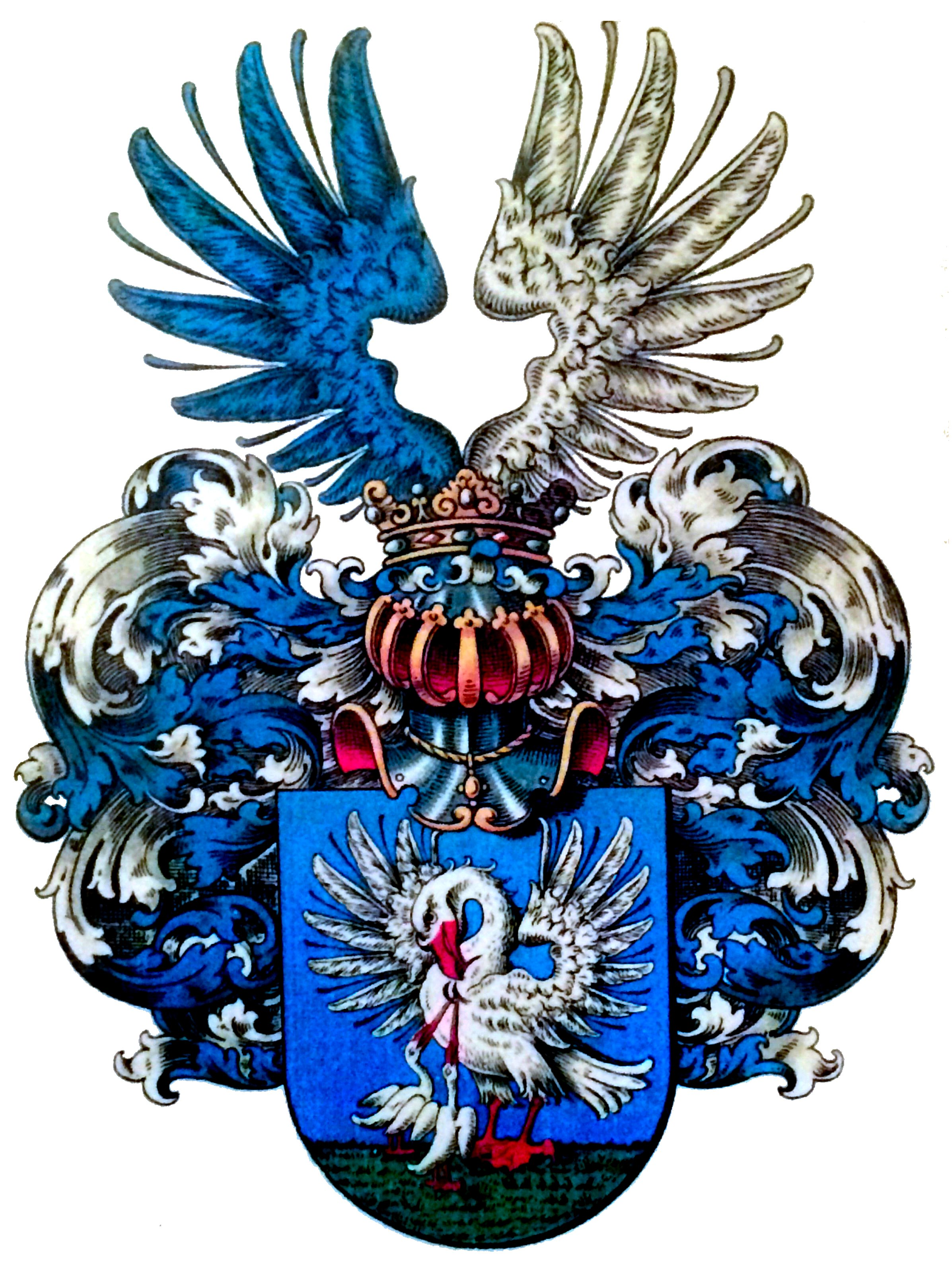 Wappen, mit welchem die Familie von Boetticher im Kurland vom Heroldiedepartement des russischen Dirigierenden Senat am 29.09.1842 als altadelig anerkannt wurde.